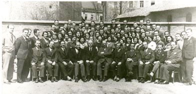 חברי אגודת המוזיקה היהודית "לה לירה" מסרייבו כפי שצולמו ב-1934